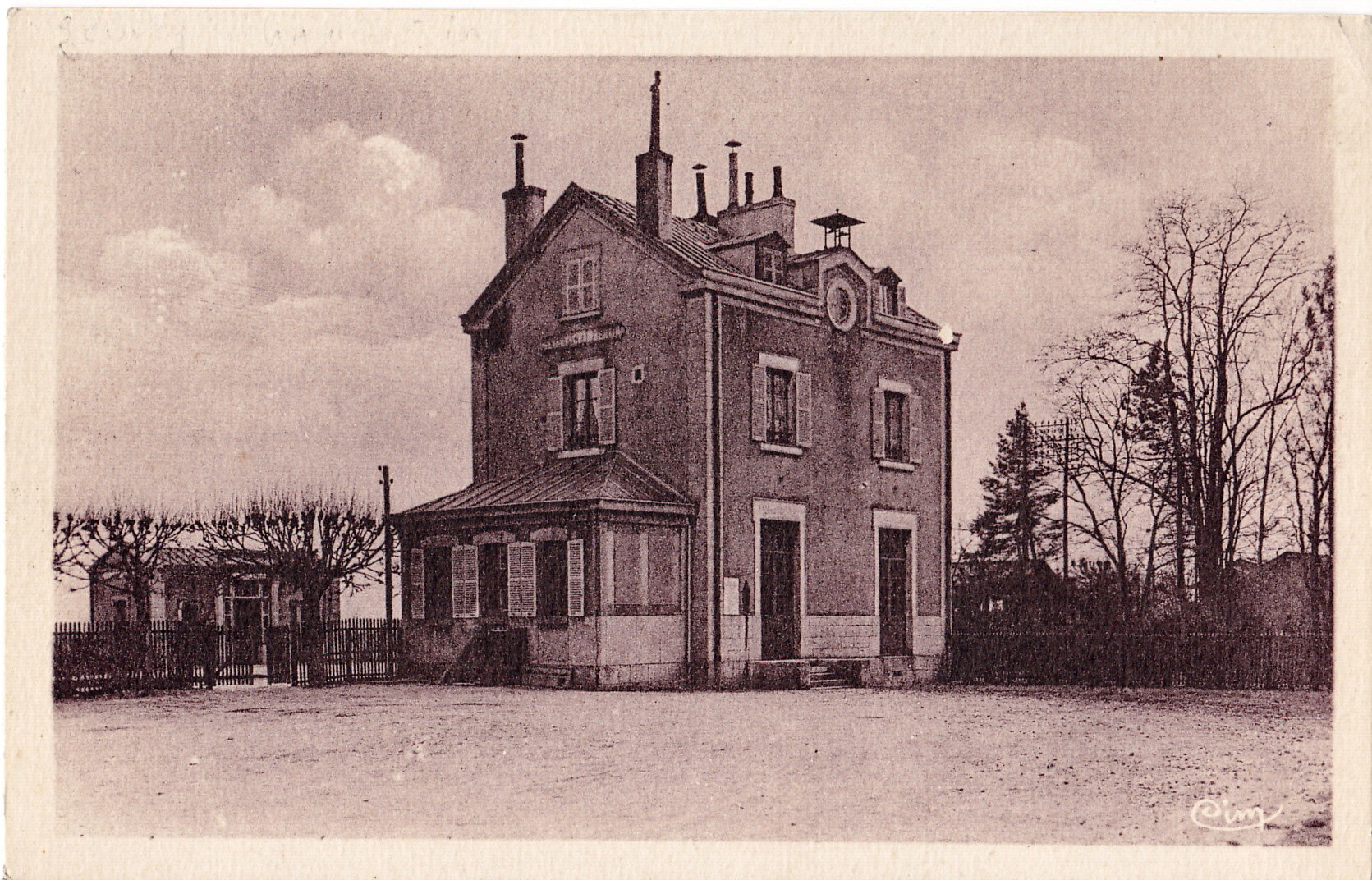 Carte postale ancienne éditée par CIM : GEVREY-CHAMBERTIN - La Gare